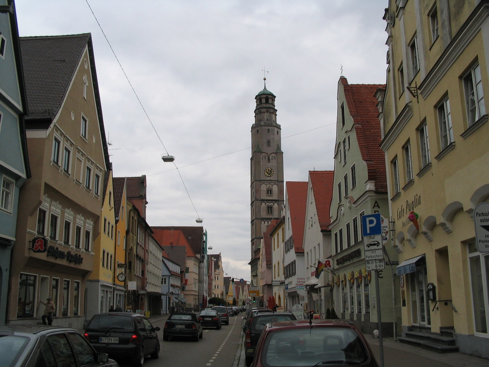 Lauingen, Germany